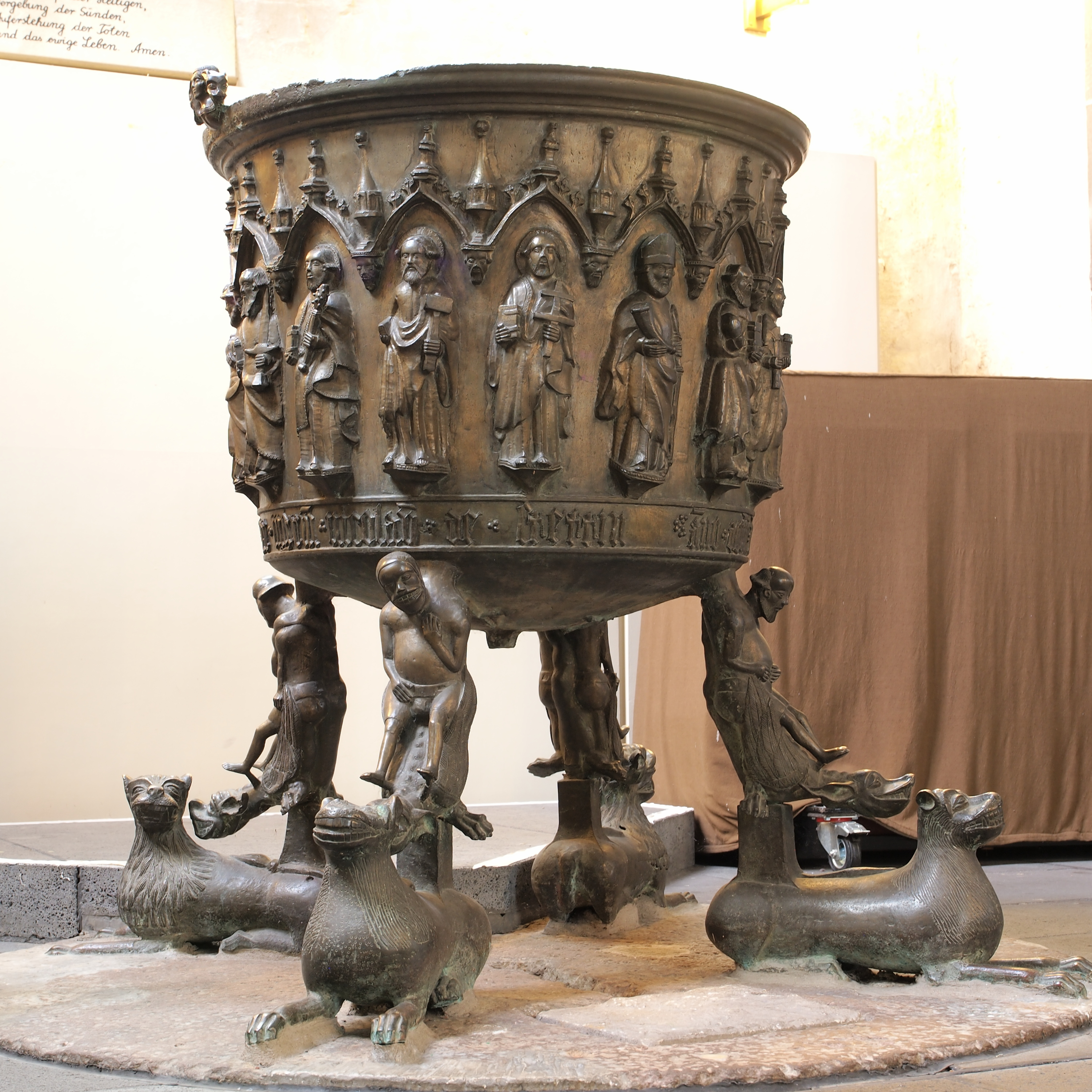 Bronzefünte von 1392 in der Kirche St. Blasius, gefertigt von Nikolaus von Stettin